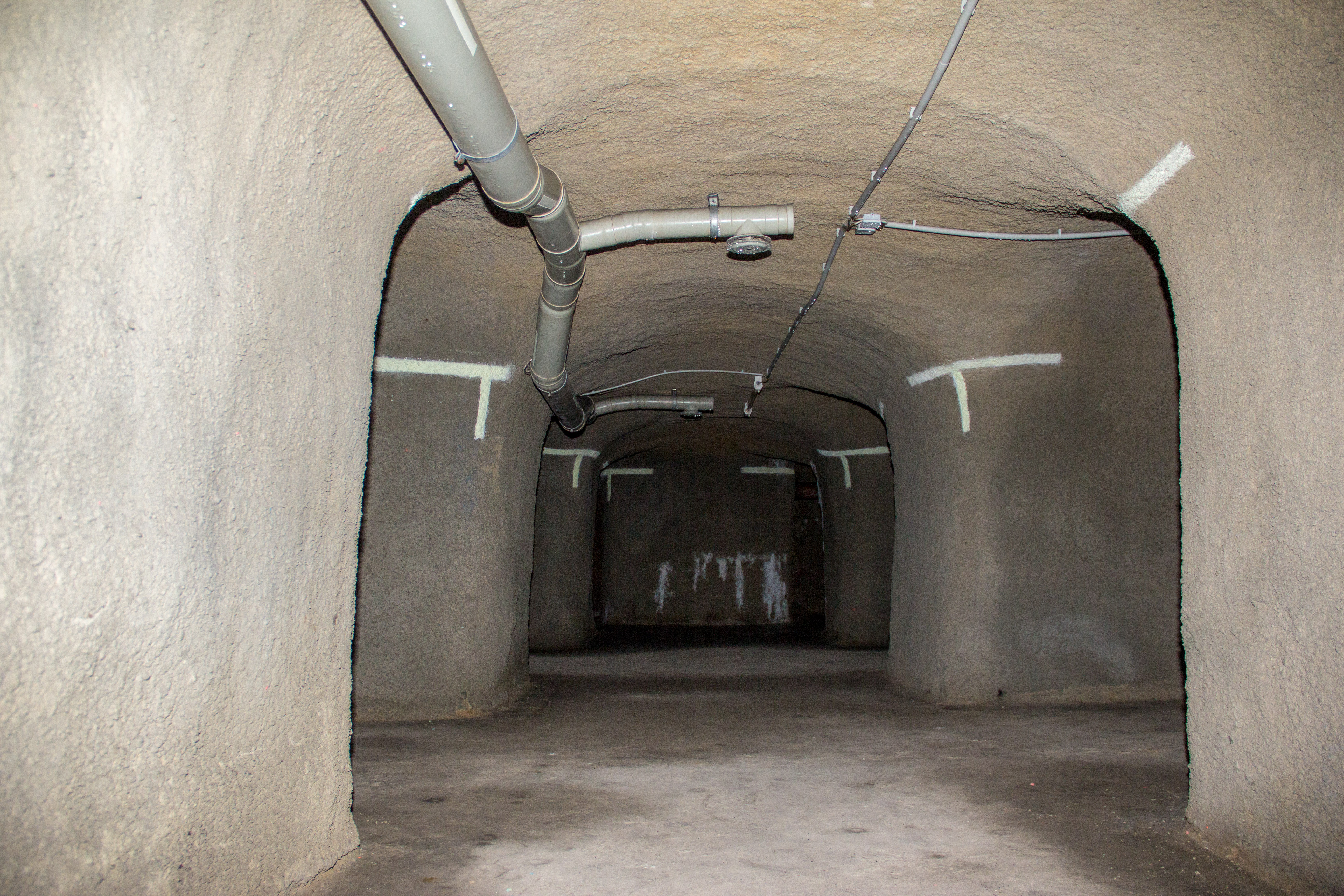 Tucherkeller, Nürnberg, ehemaliger Bierkeller, ehemaliger Bunker, Kleiner Tucherkeller